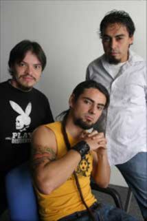 Pito Pérez - Miguel Méndez, Abraham Bustos y Jorge Chávez.